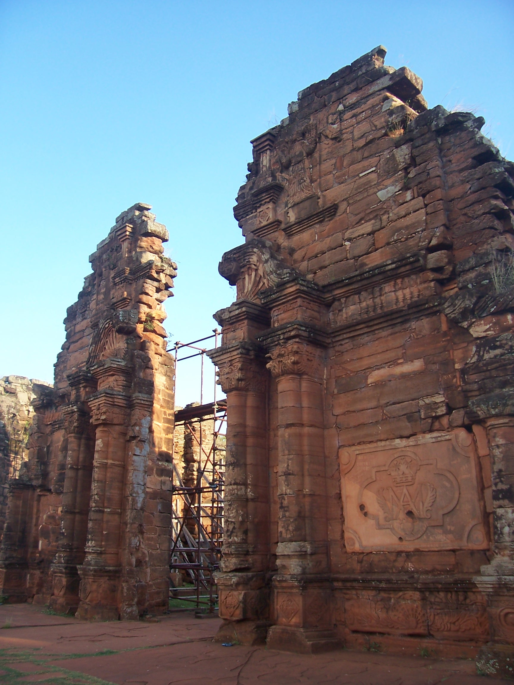 Las ruinas jesuíticas de San Ignacio Miní, en la ciudad de igual nombre, Provincia de Misiones, Argentina.